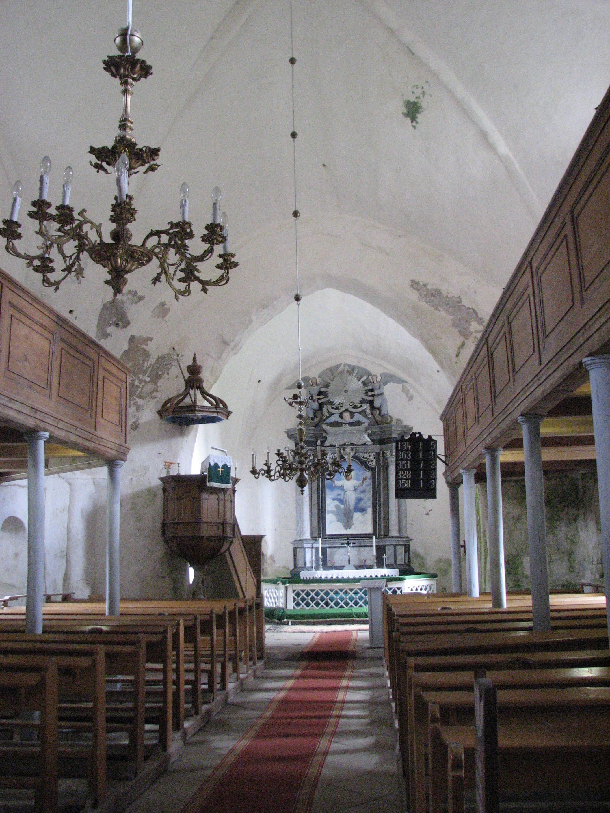 Saint church in Pihtla, Saaremaa, Estonia